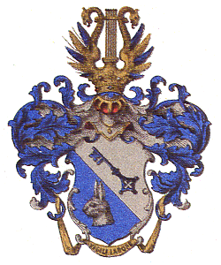 Vaakuna